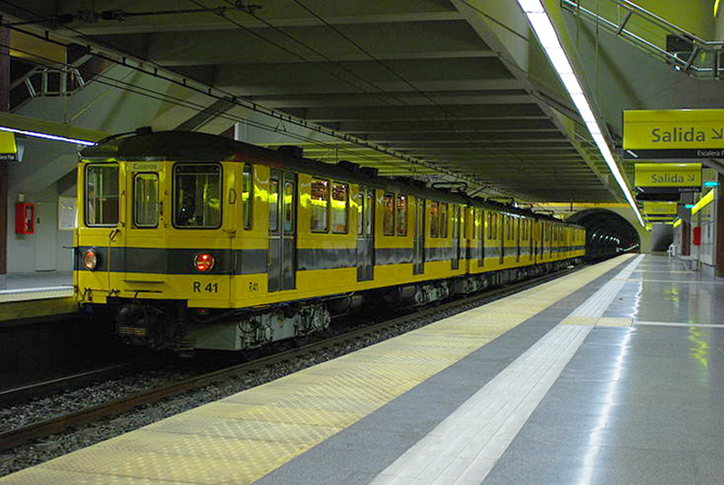 Línea H de subtes en Buenos Aires, tren en la estación Inclán (Argentina, noviembre 2008).jpg